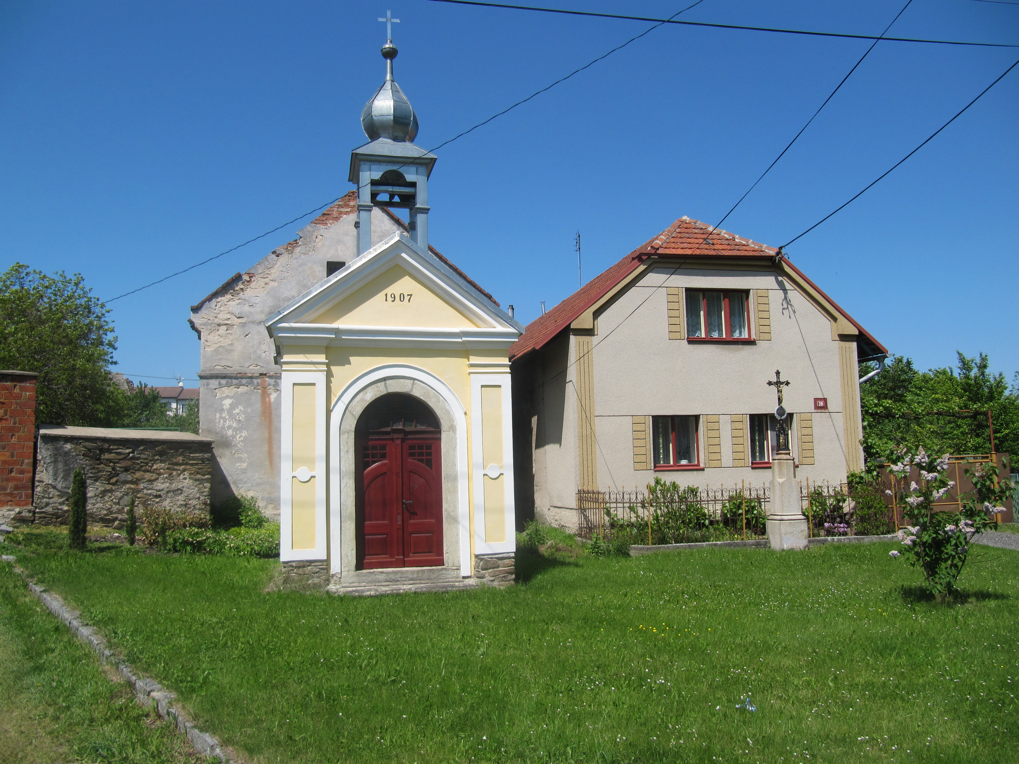 Onomyšl